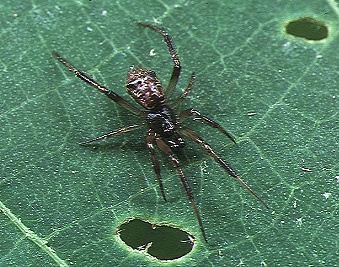 male Episinus nubilus from Okinawa.